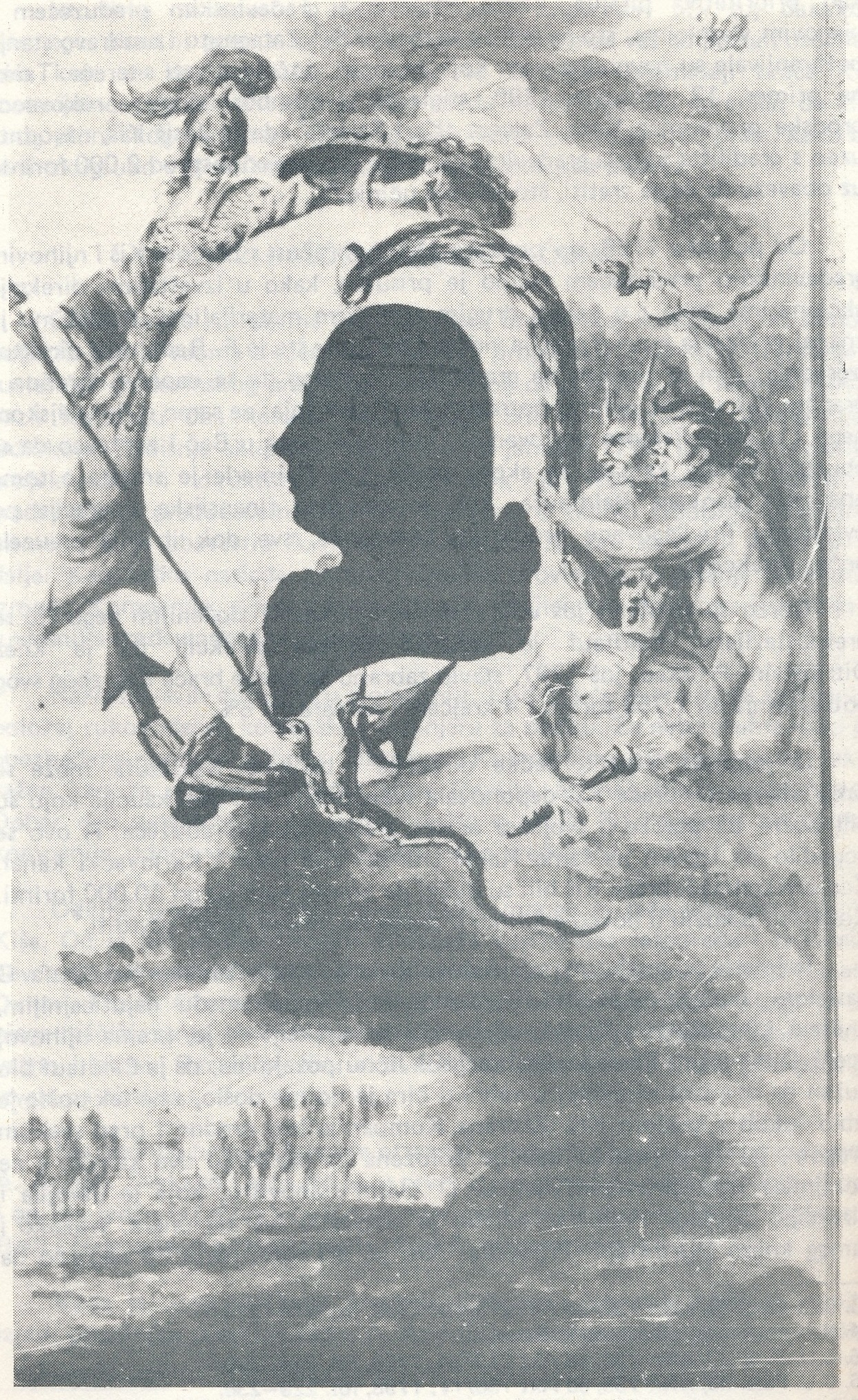 Српски (ћирилица): Аутопортрет Јожефа Киша из његовог споменара који се налази у Државној Сечењијевој библиотеци (Országos Szécsény Könyvtár) у Будимпешти.